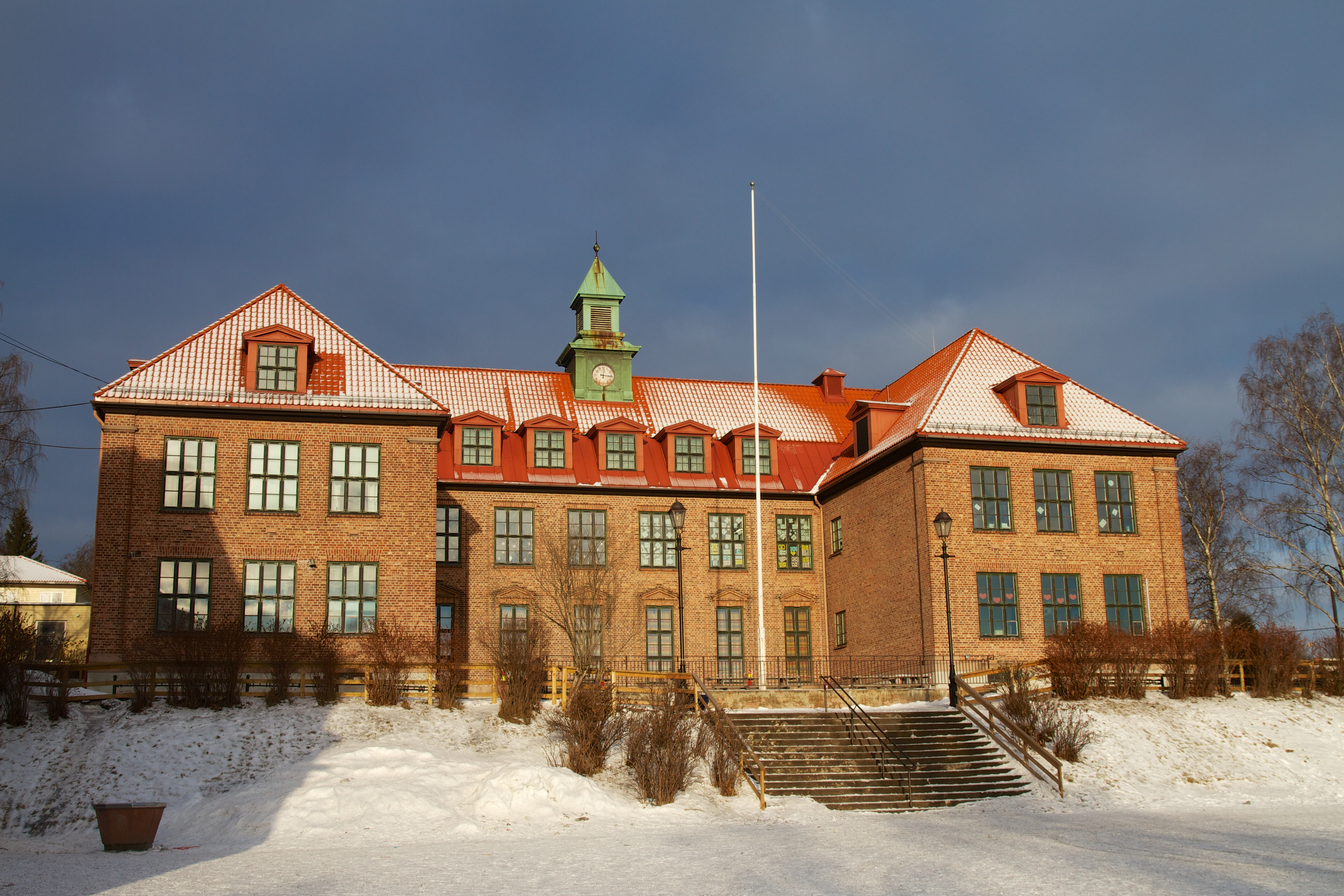 Østensjø skole i Oslo.